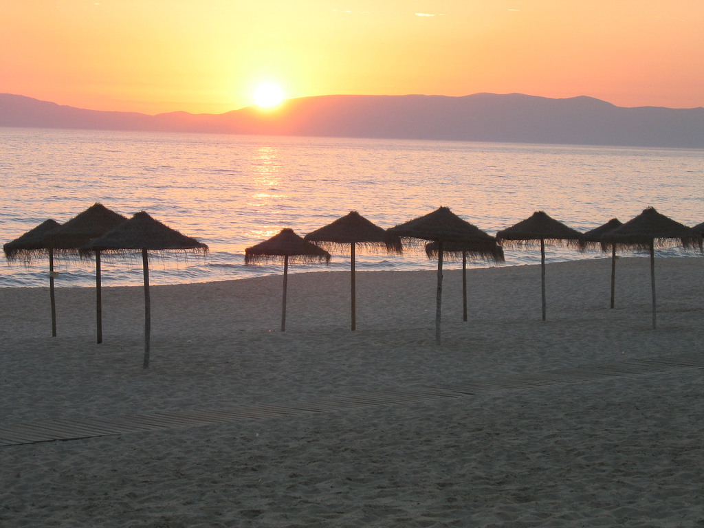 Comporta Beach - Ilha do Arroz